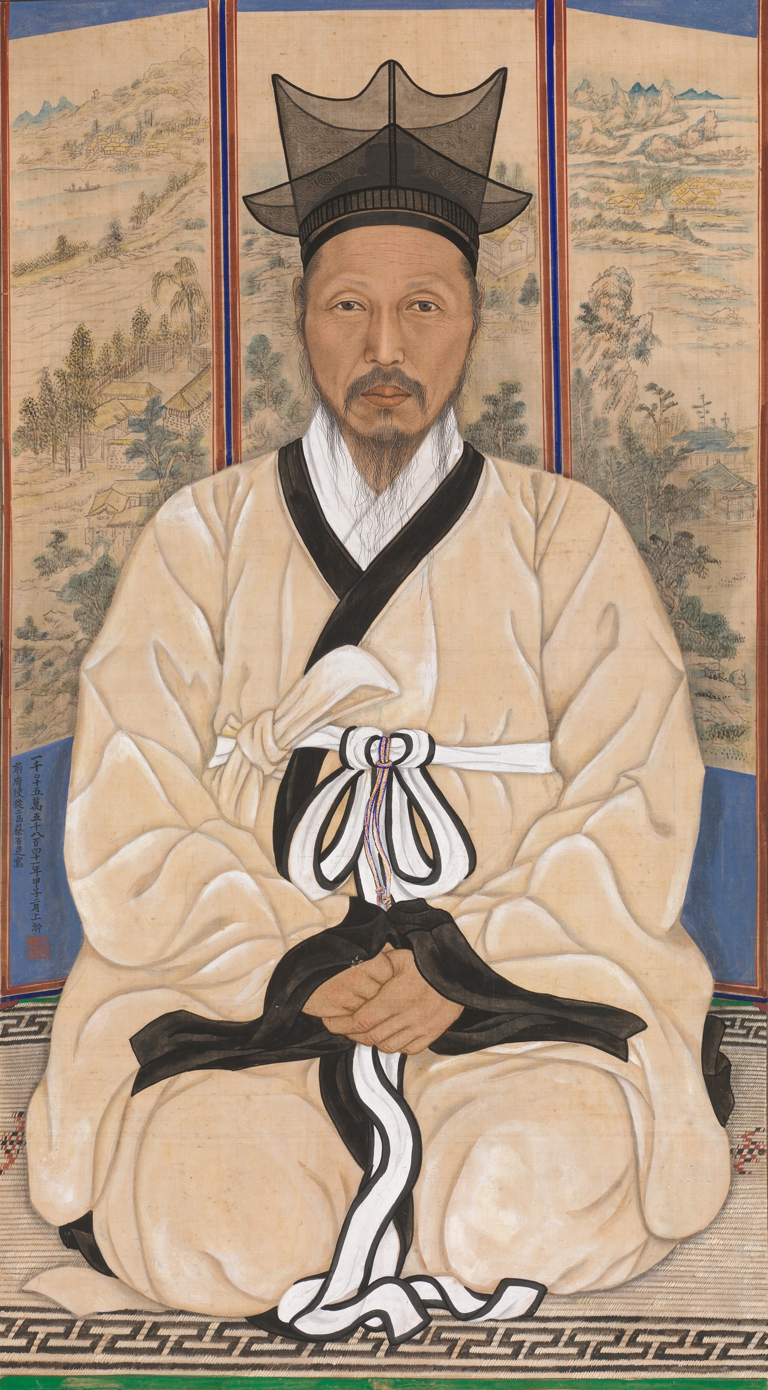 Korea; Hanging scroll; Paintings